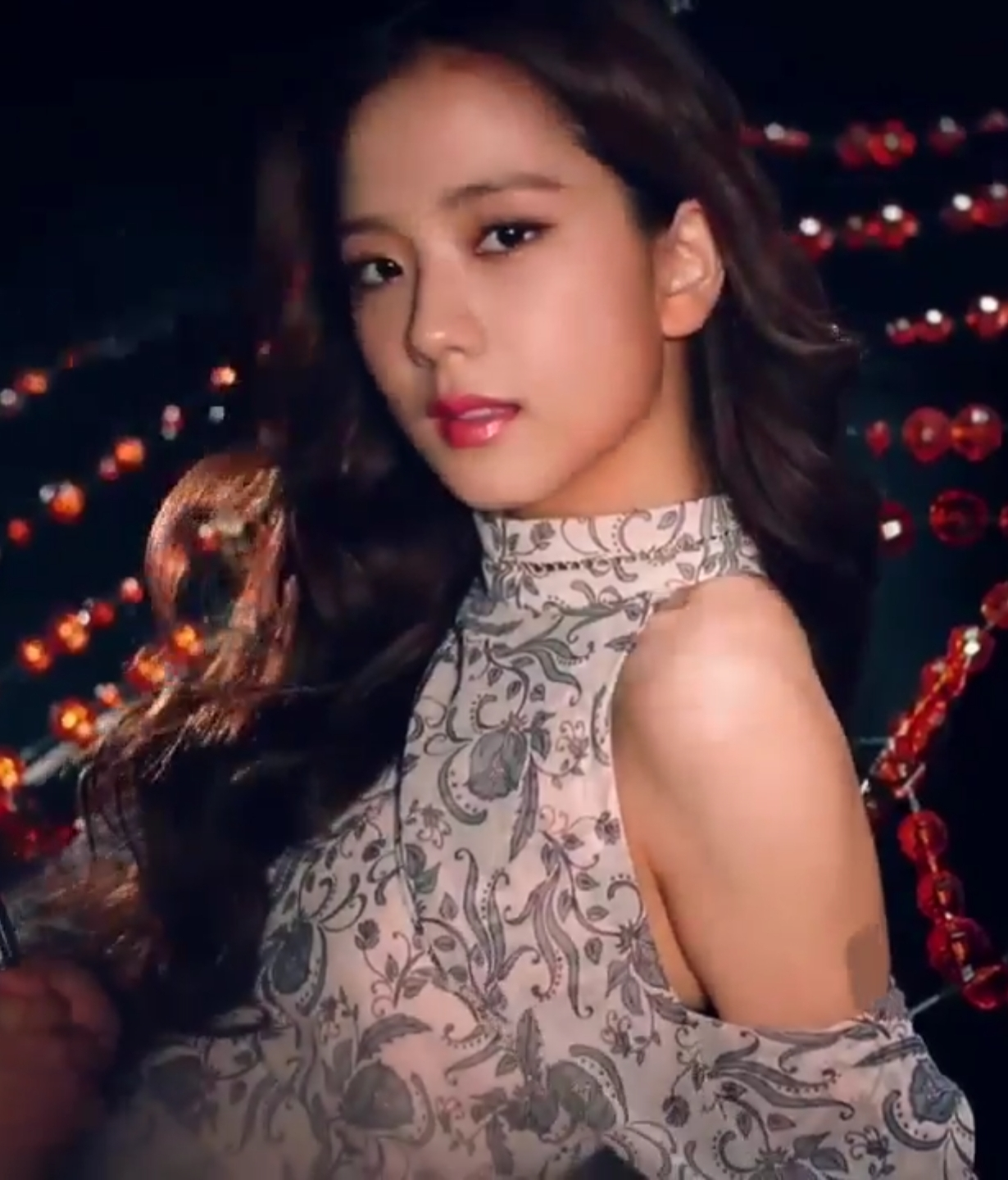 Acara Puncak Road to Shopee 12.12 Birthday Sale, Special Performance dari BlackPink.